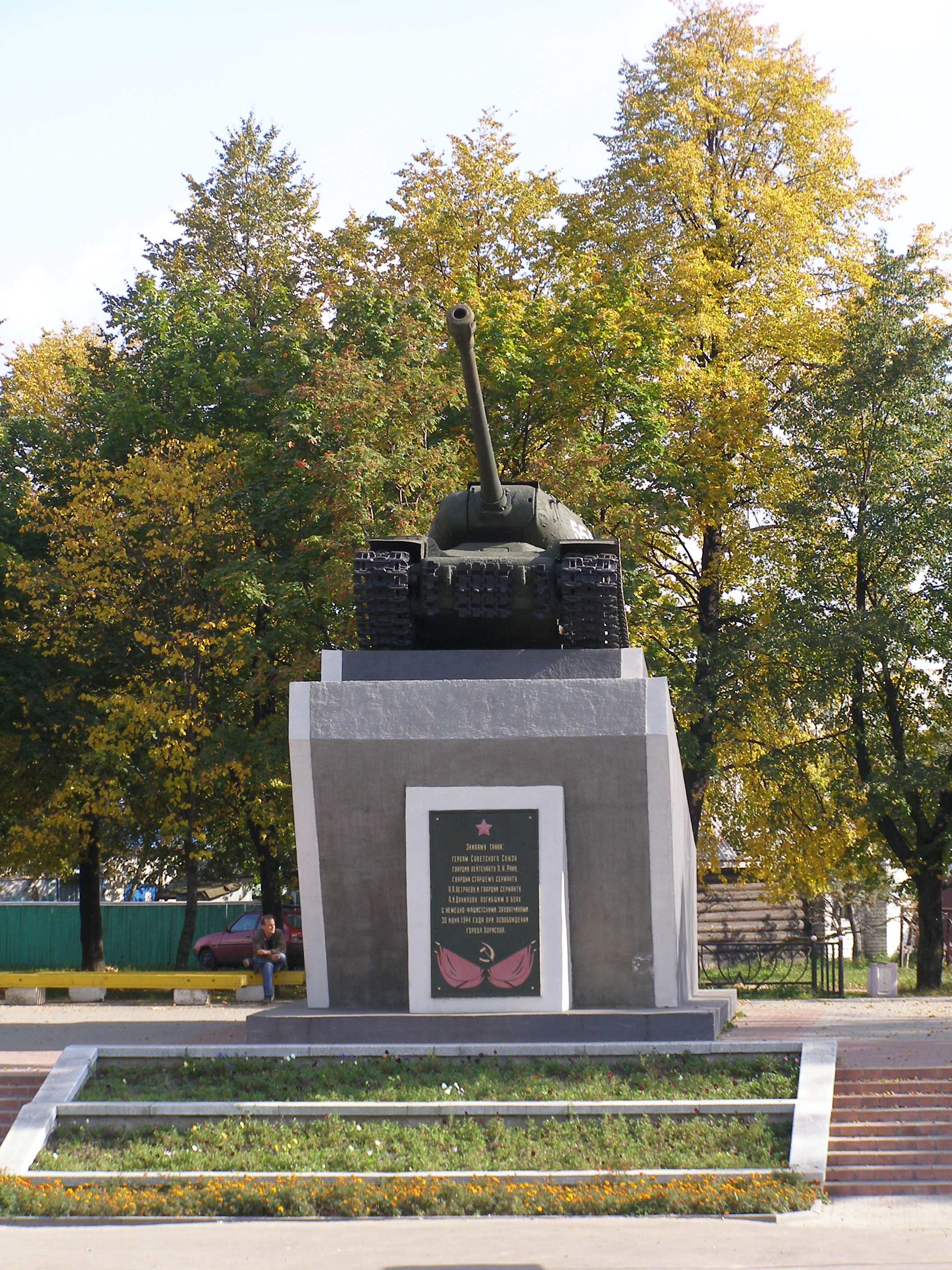 Памятник экипажу П.Рака в городе Борисов. Надпись на памятнике: «Экипажу танка: Героям Советского Союза гвардии П. Н. Раку, гвардии старшему сержанту А. А. Петряеву и гвардии сержанту А. И. Данилову, погибшим в боях с немецко-фашистскими захватчиками 30 июня 1944 года при освобождении города Борисова.»